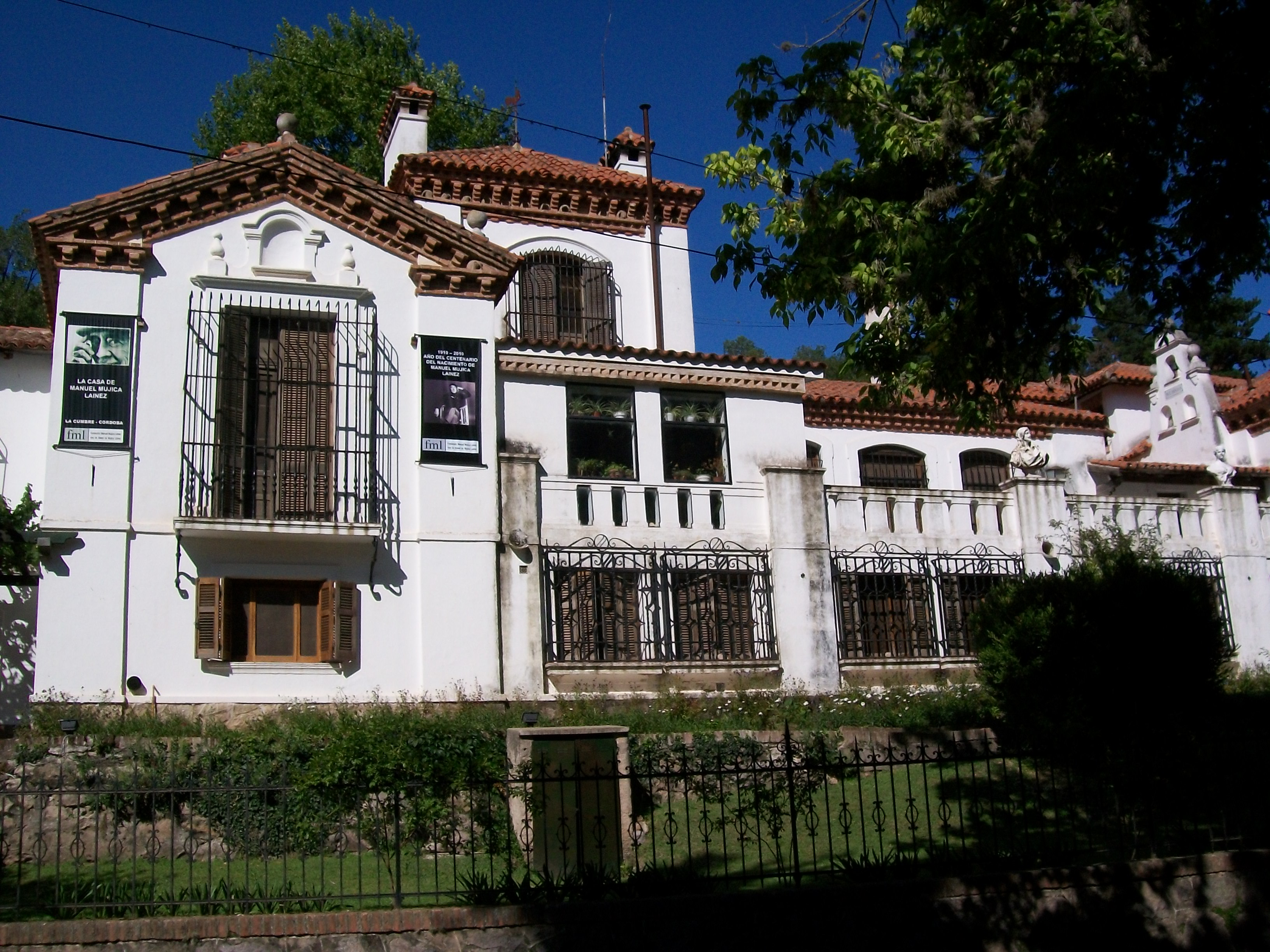 Casa de Manuel Mujca Láinez en Cruz Chica, La Cumbre, Córdoba, Argentina